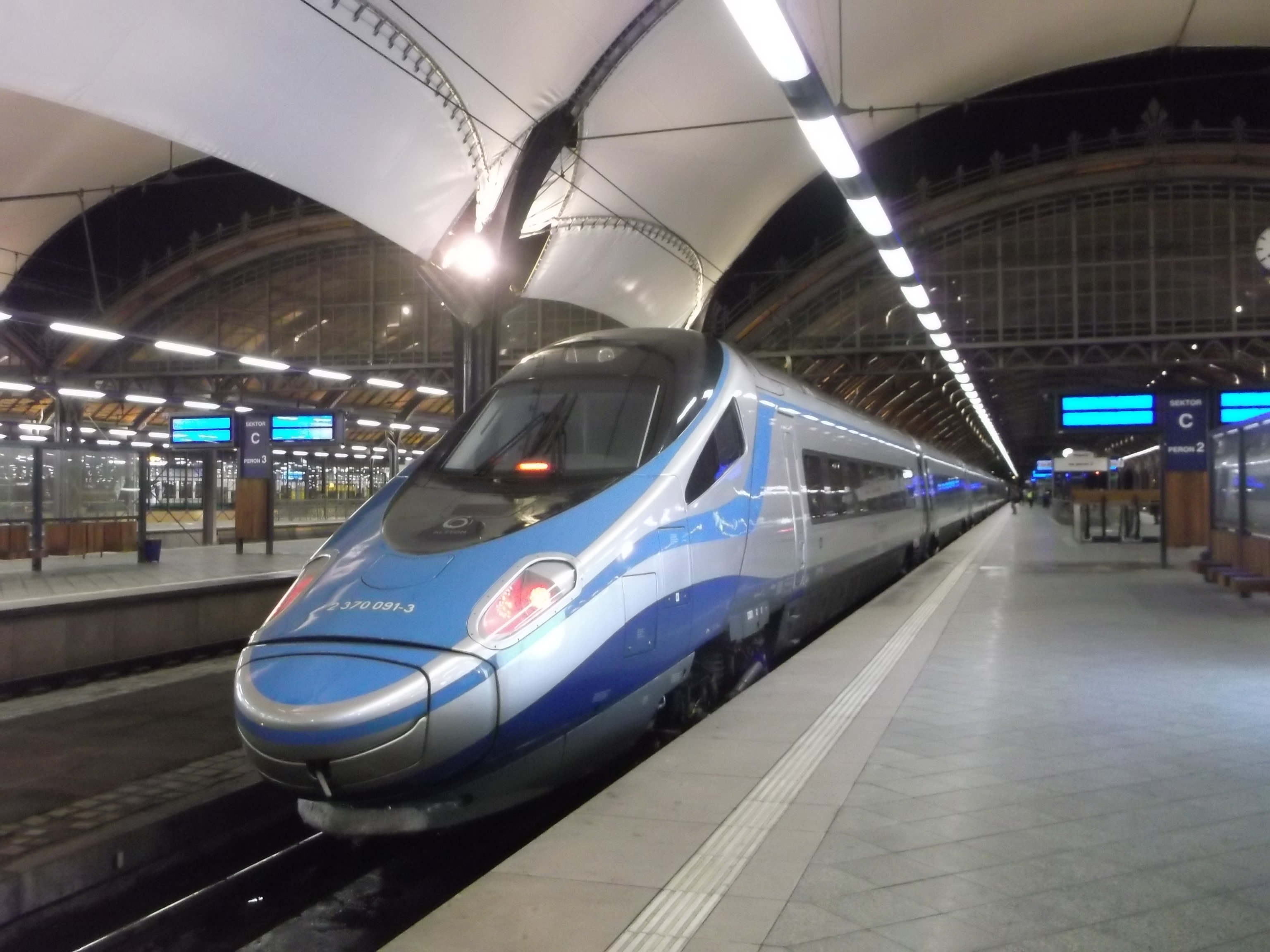 Pociąg Express Intercity Premium przy peronie 2 na stacji Wrocław Główny